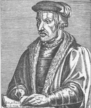 Henri Cornelis, dit Agrippa. Source De Occulta Philosophia